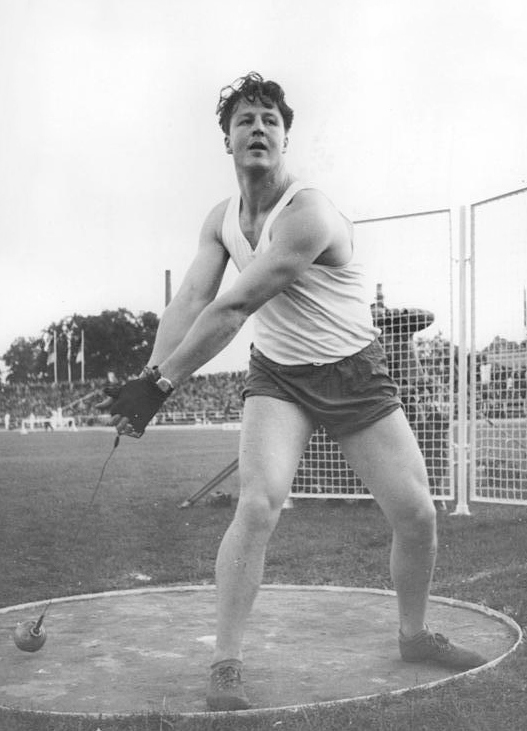 Sverre Strandli Zentralbild Funck Hein 20.9.55 Leichtathletik - Länderkampf Norwegen - DDR Vom 20. - 21.9.55 findet im "Stadion der Freundschaft" in Frankfurt-Oder ein Leichtathletik - Länderkampf zwischen Norwegen und der DDR statt. UBz: Sieger im Hammerwerfen wurde der Exweltrekordler Sverre Strandli (Norw.)